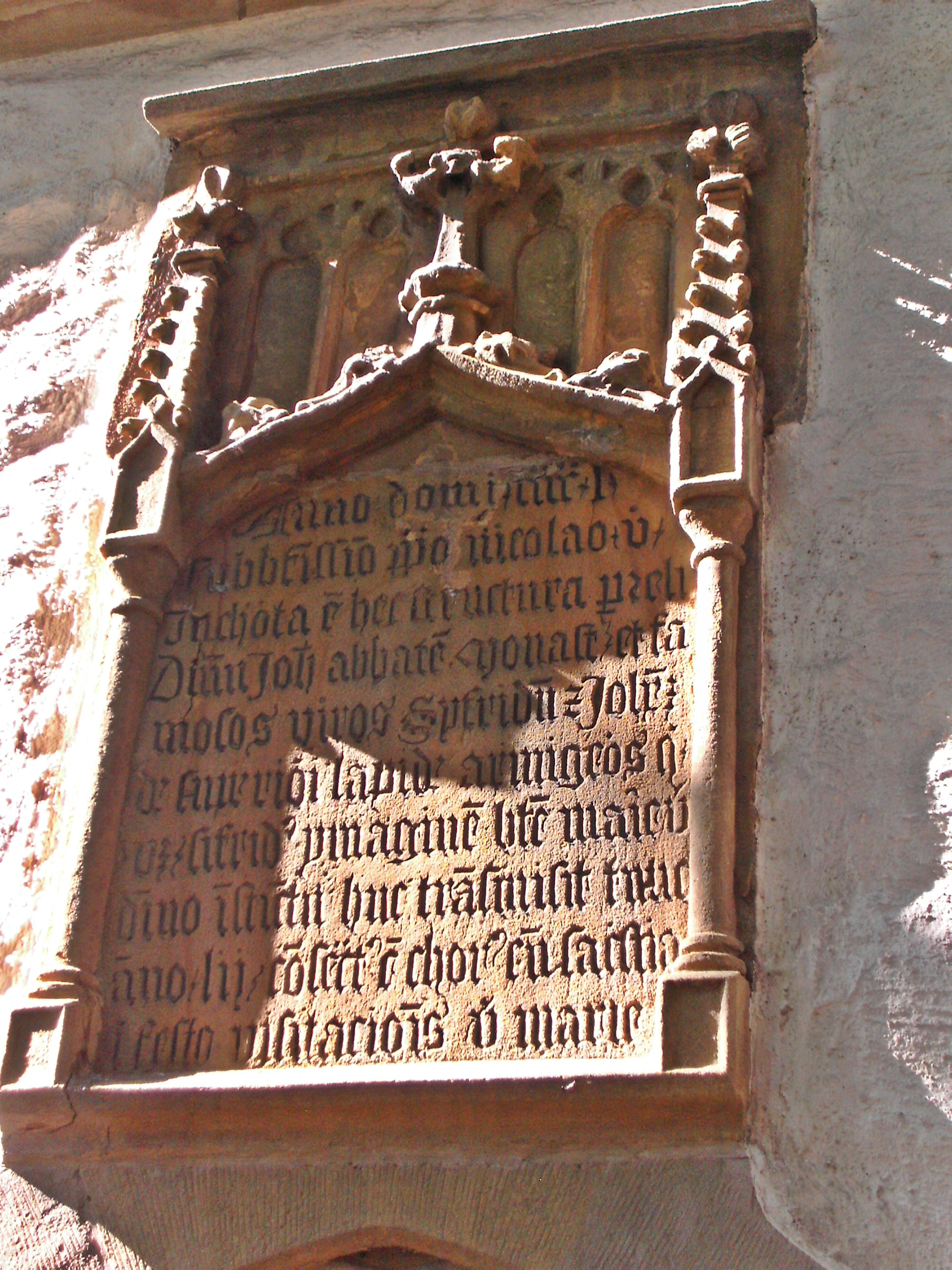 Kirche Steinbach am Donnersberg, gotischer Gedenkstein zur Kirchweihe 1452, durch den Abt des Klosters Münsterdreisen.